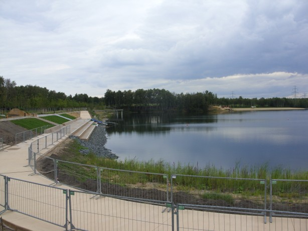 Landesgartenschau Norderstedt, Baustelle Seepromenade (Seepark), im Hintergrund das Strandbad